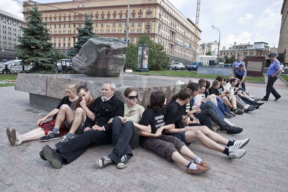 Нацболы протестуют у Соловецкого камня